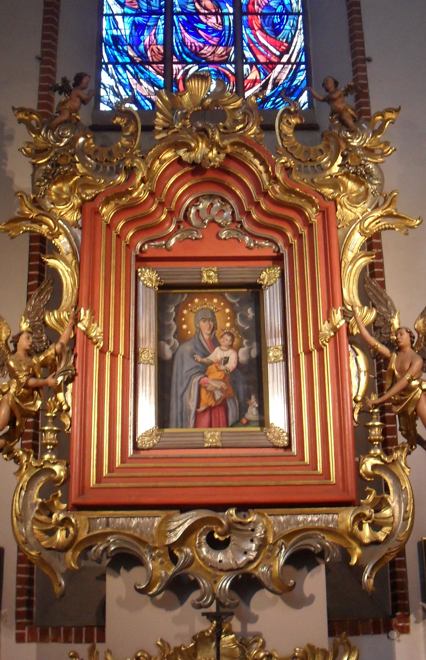 Wrocław, kościół pw. św. Wojciecha, obraz Matki Bożej Podkamieńskiej